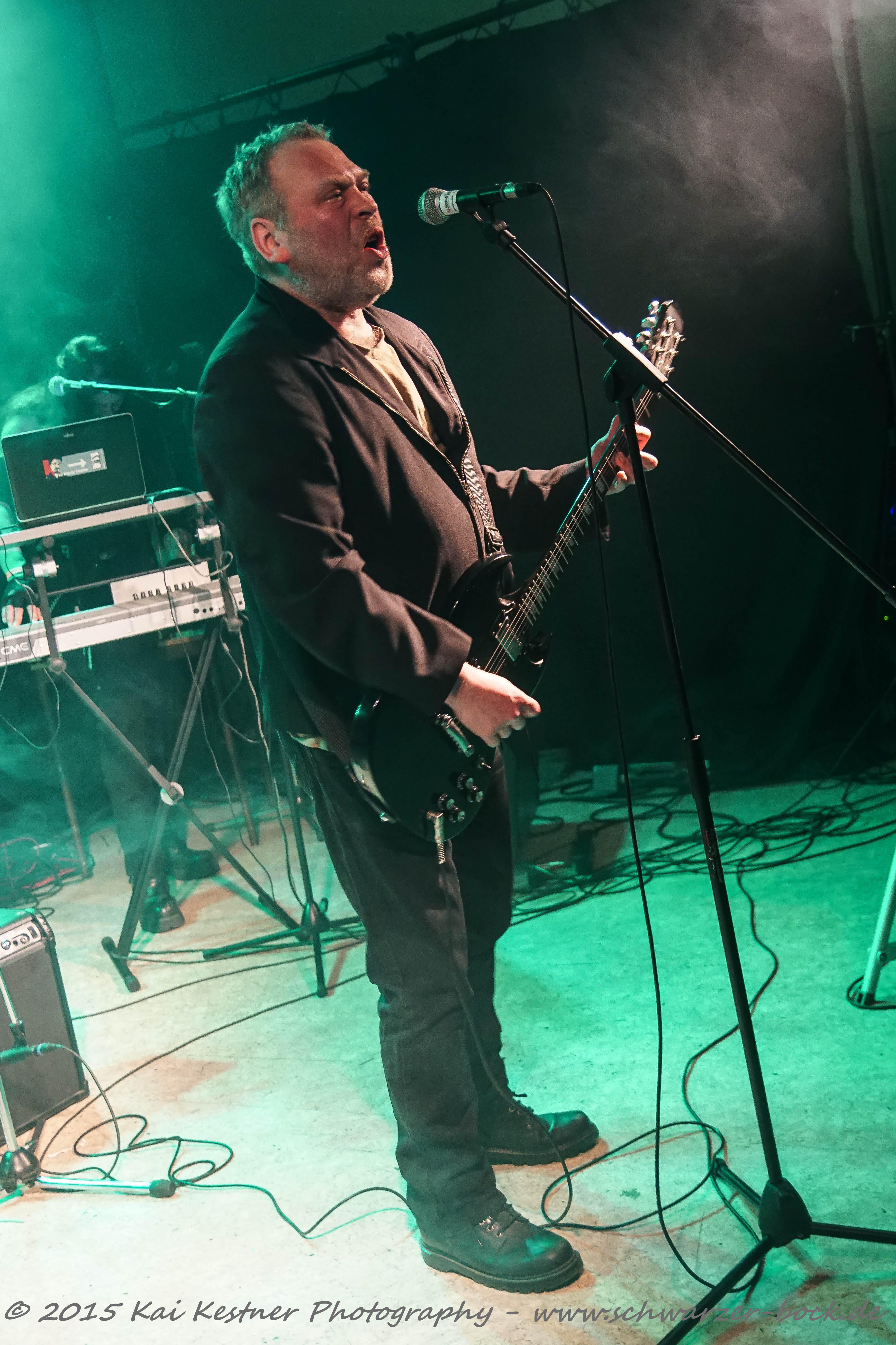 Tommi Stumpff, Haus der Jugend Hettstedt, 04.04.2015